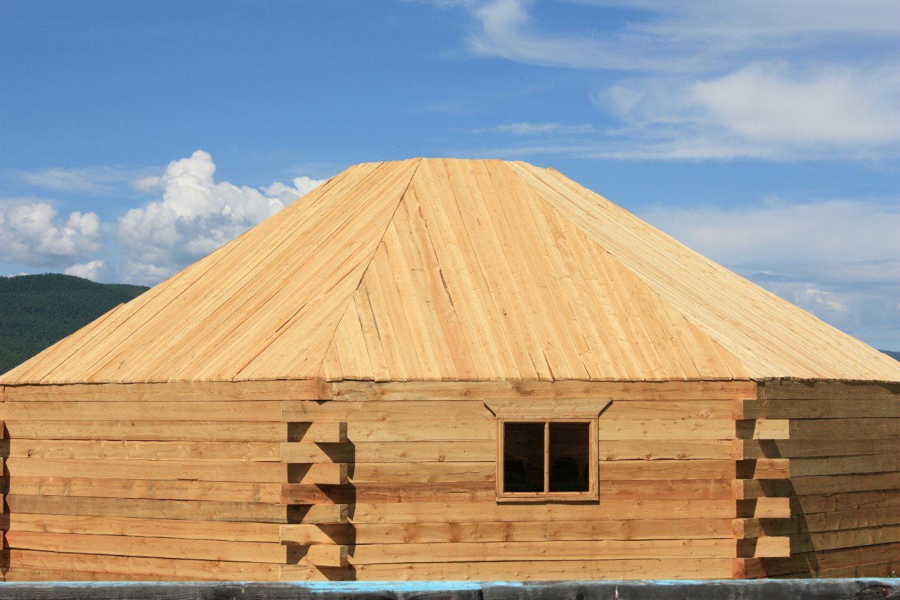 The wooden yurt under construction in Zakamensky district of Buryatia, Russia